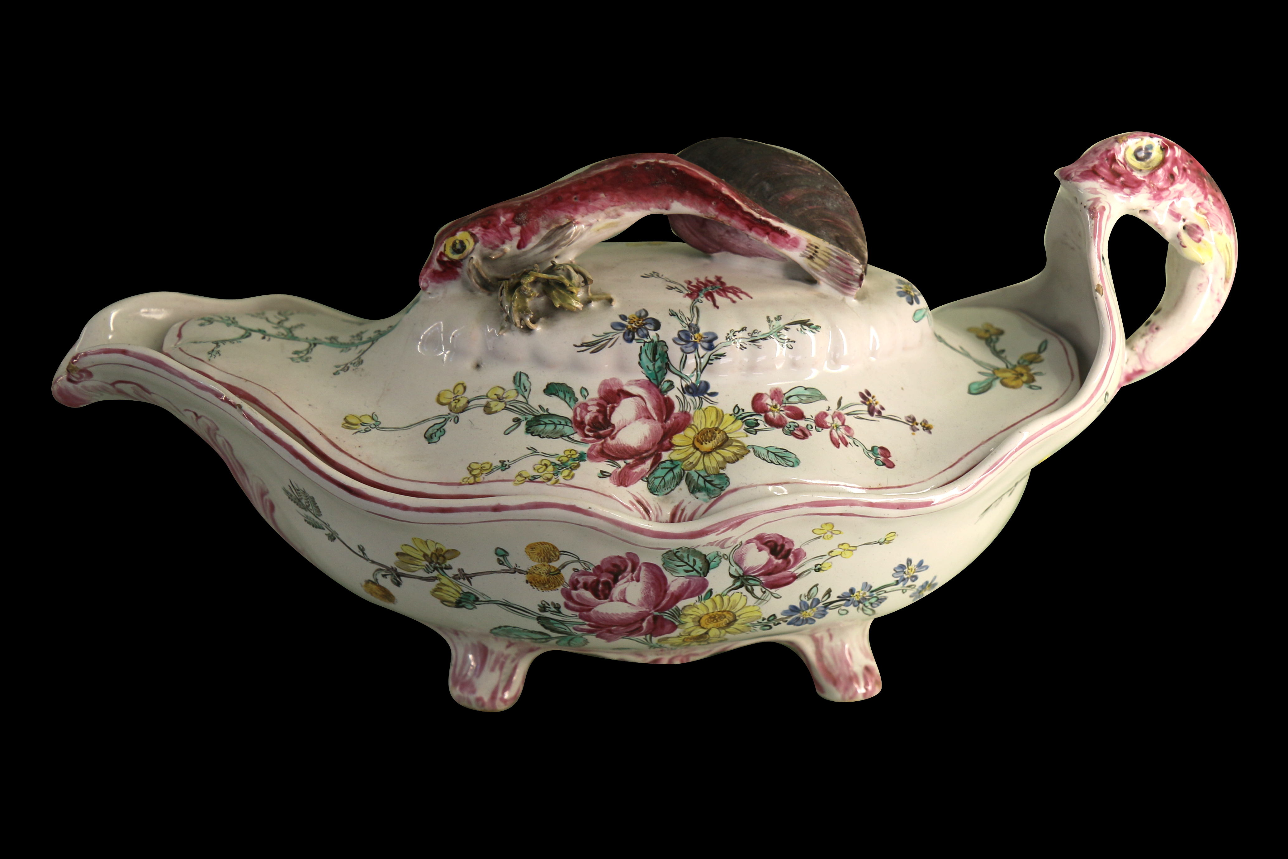 Saucière couverte oblongue à bord contourné, sur quatre pieds, prise en forme de rascasse pour le corps de la saucière et d'une moule pour le couvercle. Faïence de Marseille à décor petit feu polychrome. Seconde moitié du XVIII° siècle.